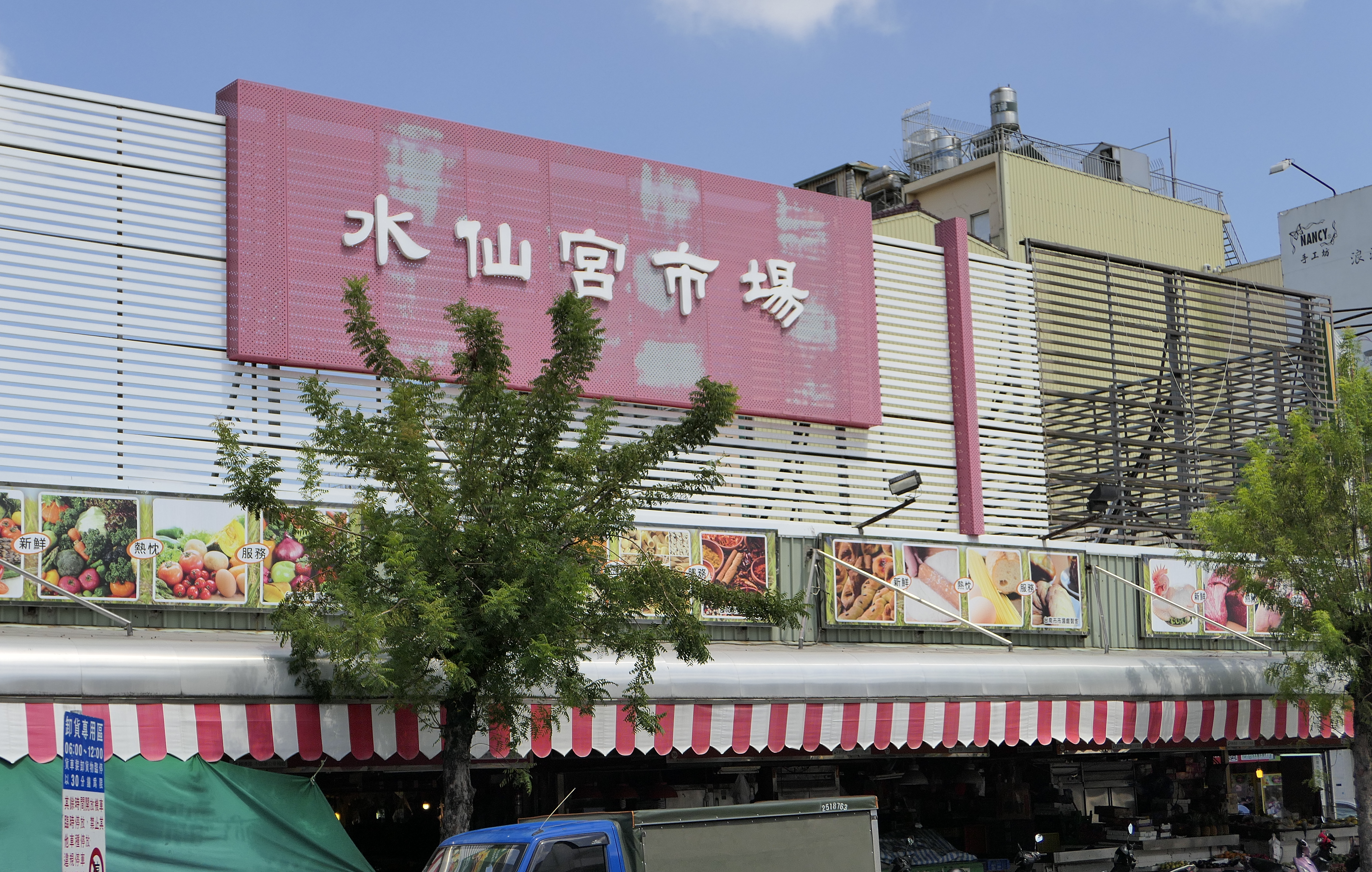 中文（台灣）: 臺南水仙宮市場